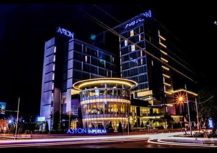 hotel aston purwokerto